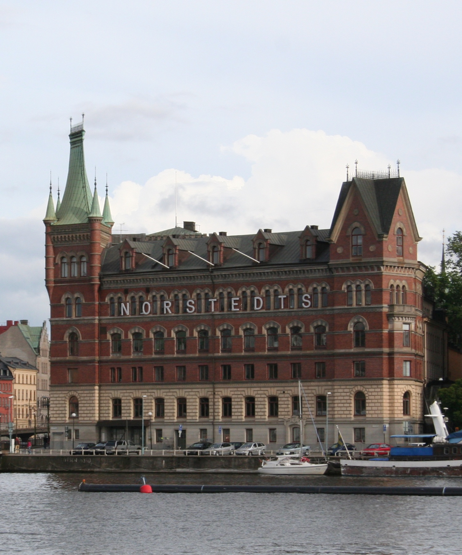 Norstedtshuset på Riddarholmen i Stockholm. Källa: eget foto, fotograf EnDumEn